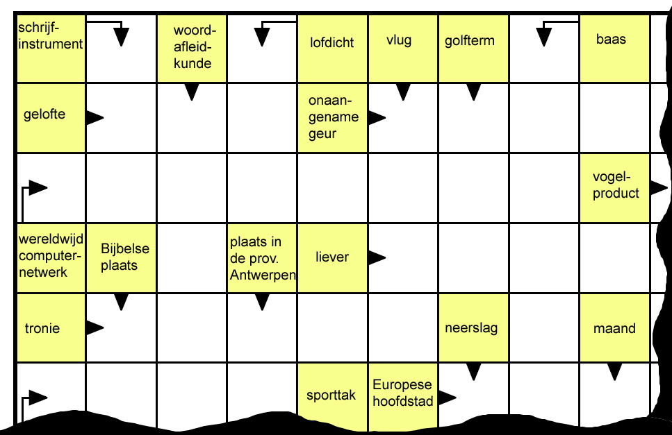 fragment van een Zweedse puzzel